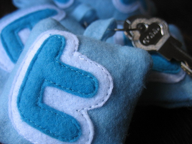 Esta semana (10/08/09) o Mercado Mambembe vai sortear estes chaveiros fofinhos p/ quem RT a promoção no Twitter com hashtag #mercadomambembe. Fiquem ligados e sigam o @mercadomambembe O Mercado Mambembe continua com FRETE GRÁTIS! :)